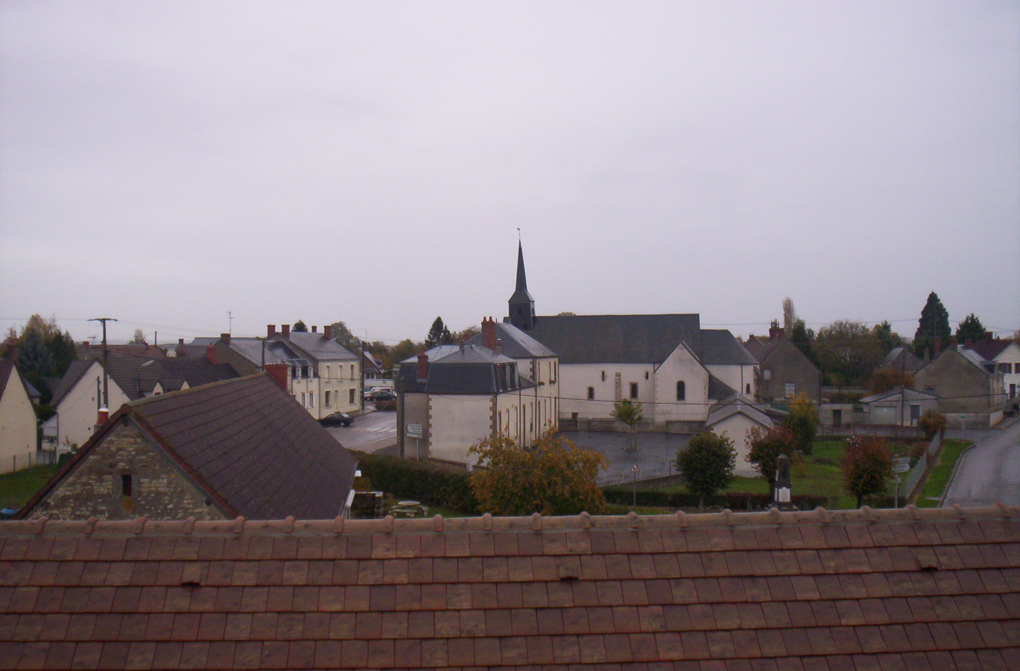 Couy, Centre, France